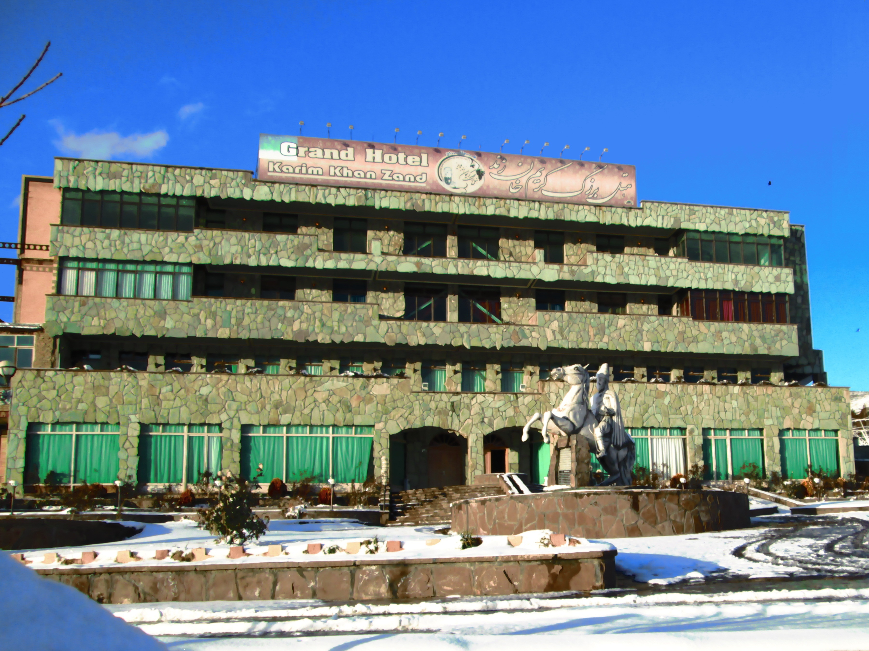 هتل کریم خان زند ملایر